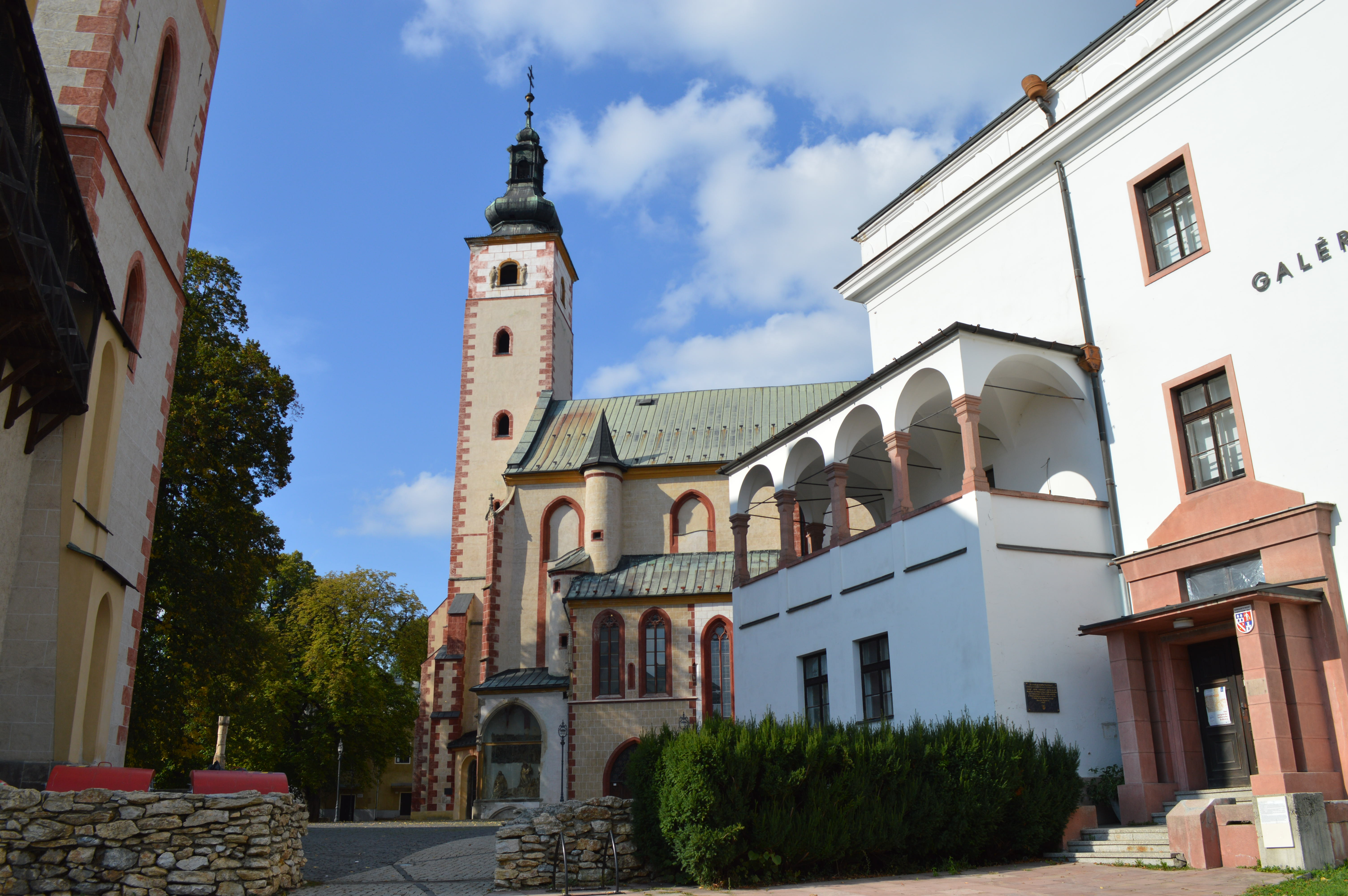 Kostol Nanebovzatia Panny Márie